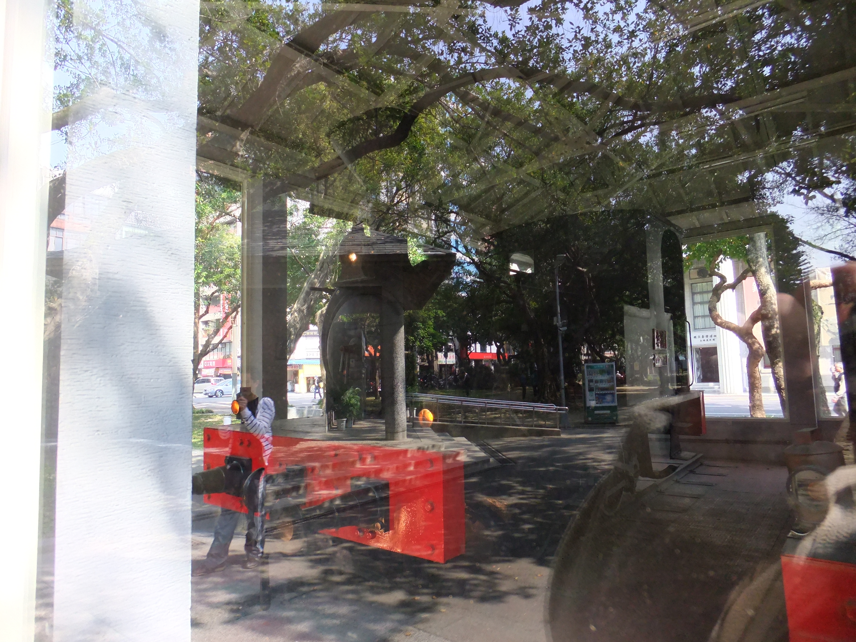 国立台湾博物館前、台湾総督府鉄道1形蒸気機関車「騰雲号」。